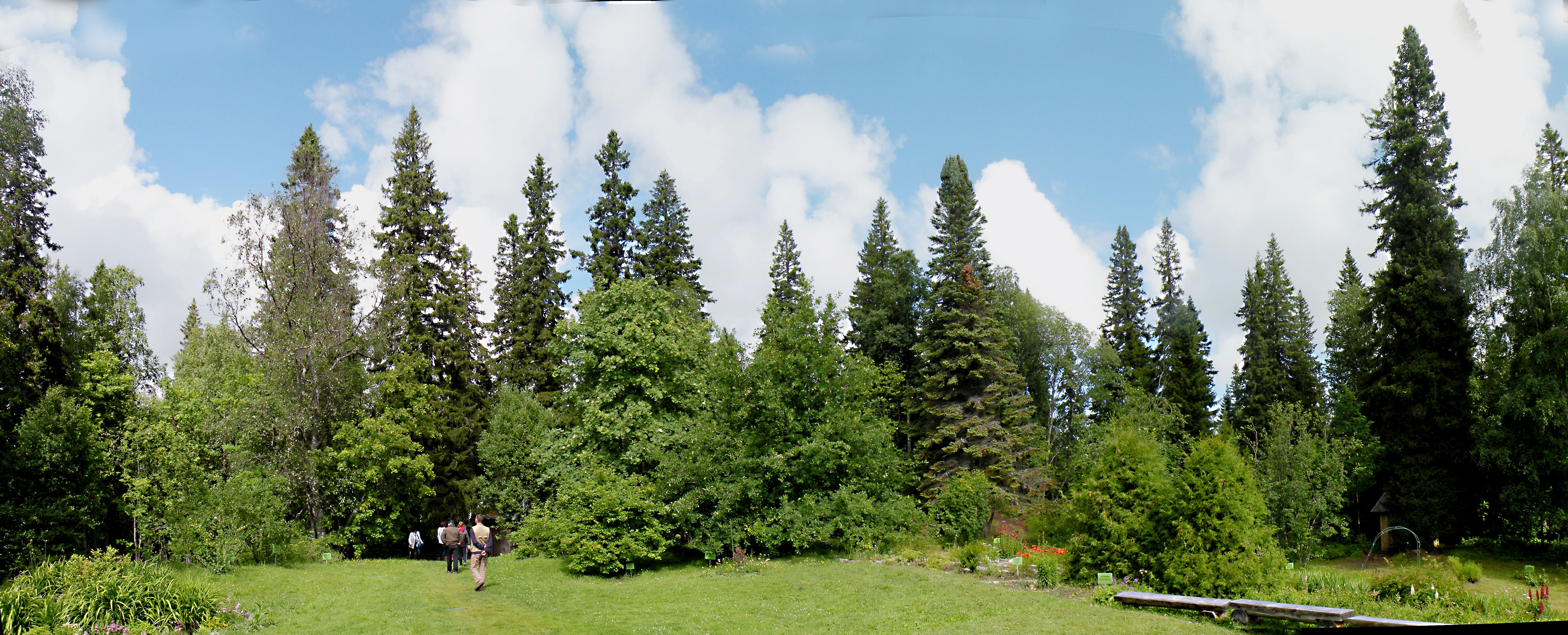 Верхняя часть Ботанического сада